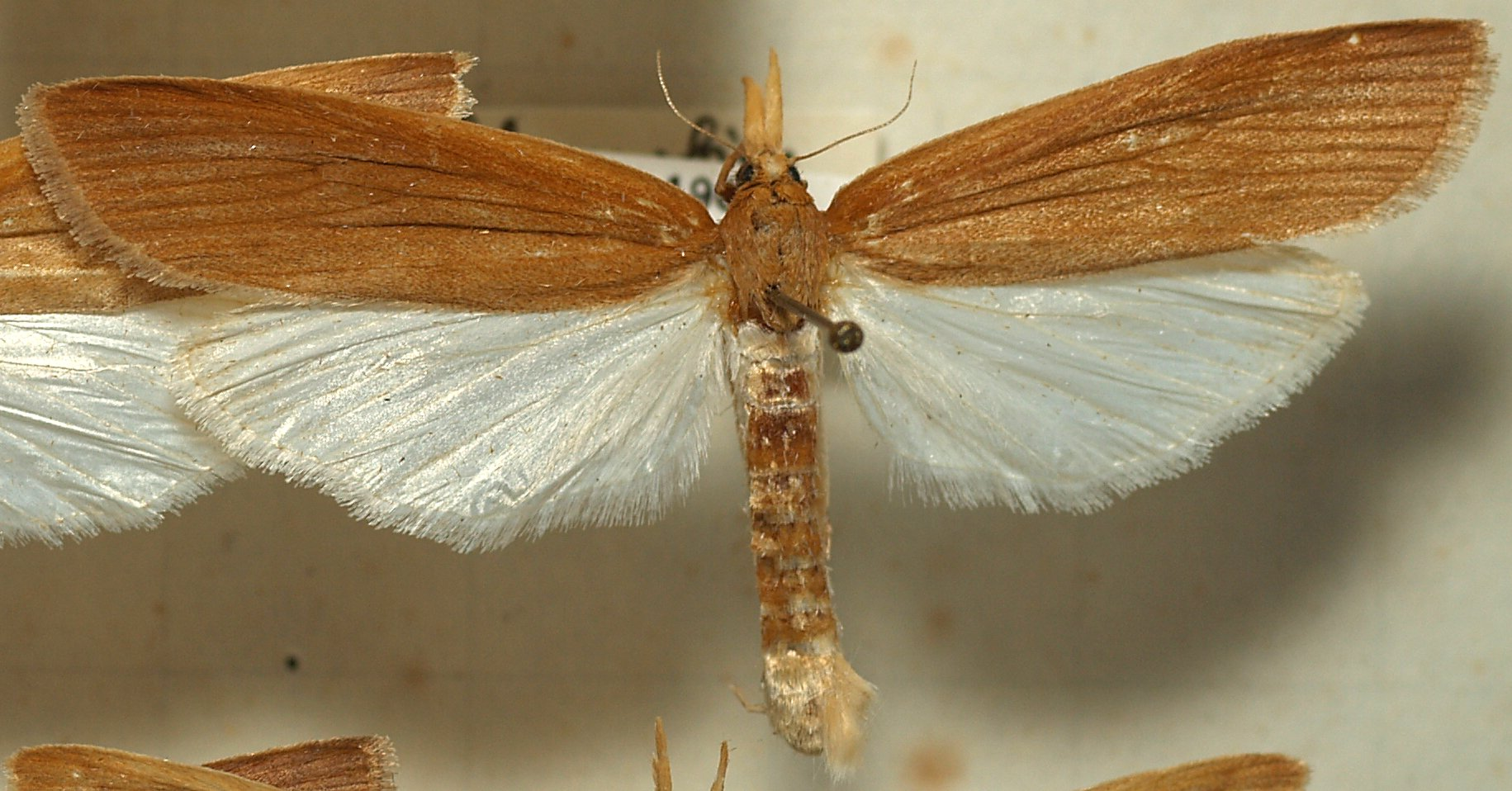 Schoenobius gigantellus